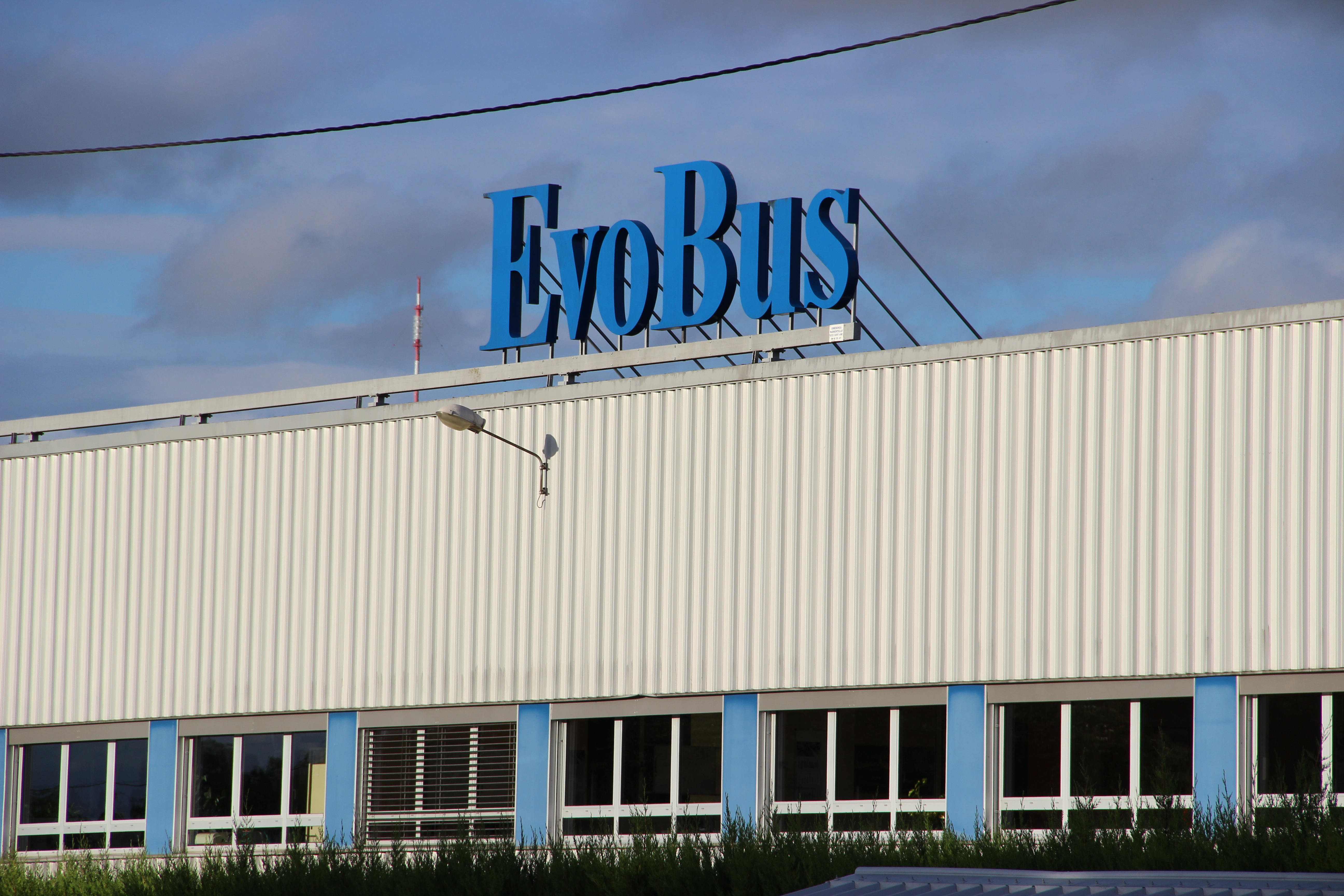 L'usine Evobus de Ligny-en-Barrois (55), site d'assemblage du Mercedes-Benz Citaro